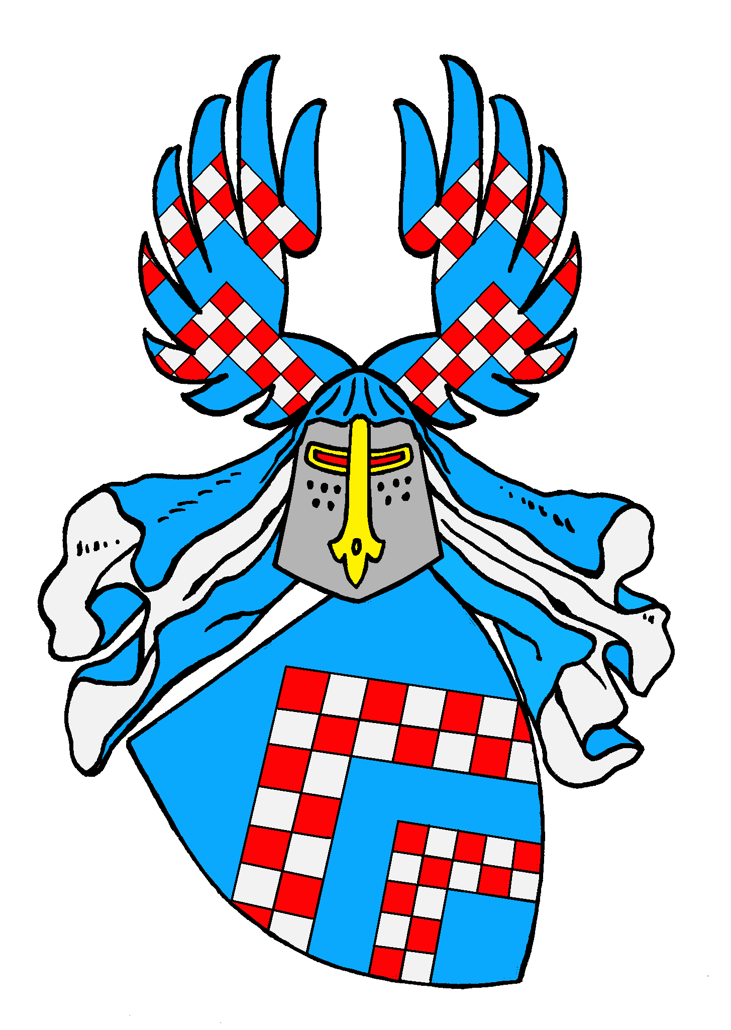 Stammwappen der Schall (Schall von Horbell bzw. Schall von Bell bzw. Grafen Schall-Riaucour). Das Geschlecht ist nach den Raitz von Frentz die zweitälteste noch bestehende Familie des Kölner Patriziats, die mit dem Patrizier Rupert Schall (Schallo, Schallin) am Neumarkt in Köln (urkundlich um 1150 bis 1200) erstmals nachweisbar ist.